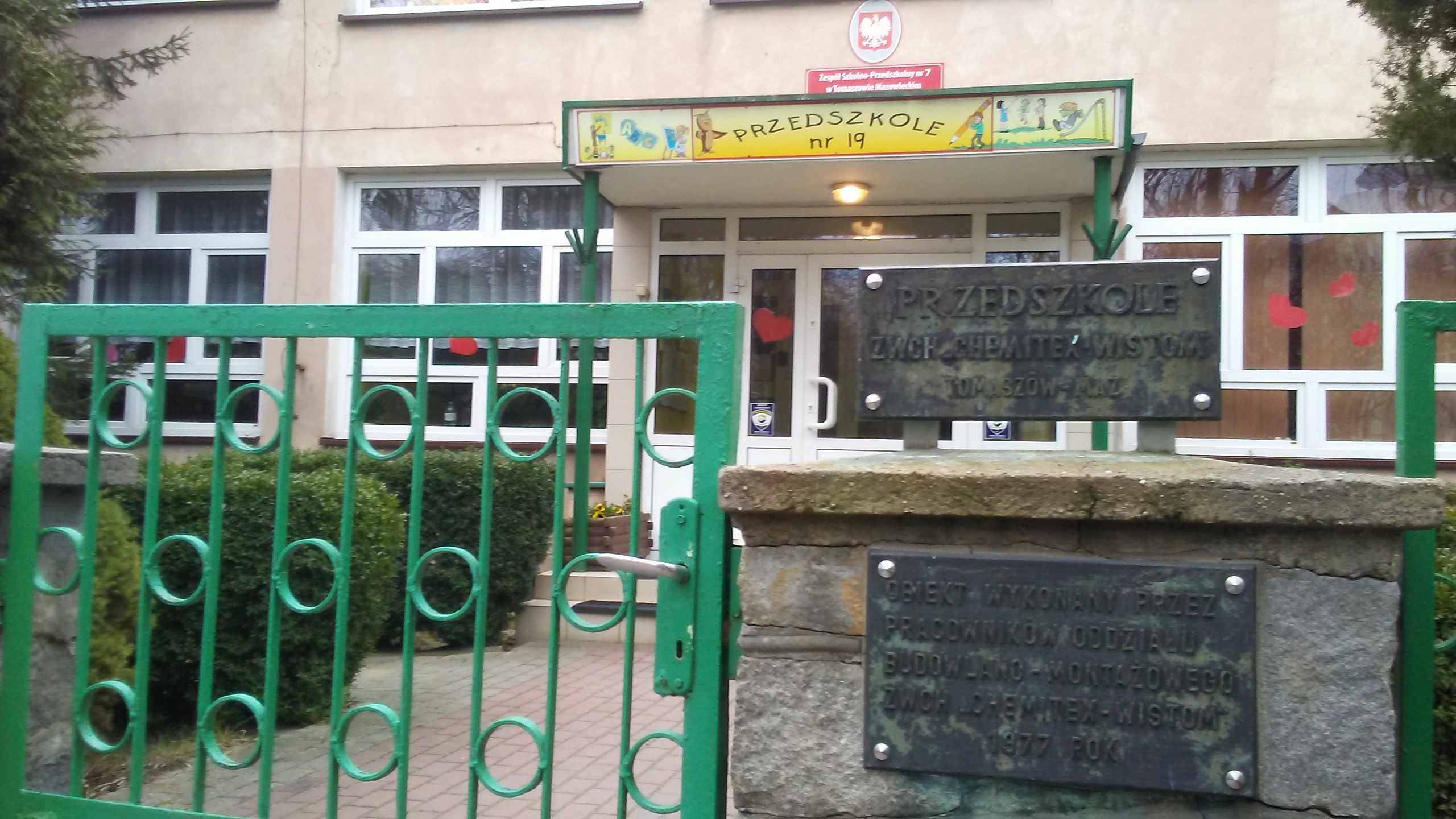 Fotografia przedstawia publiczne przedszkole nr 12 przy ulicy Strzeleckiej 14 w Tomaszowie Mazowieckim, woj, łódzkie